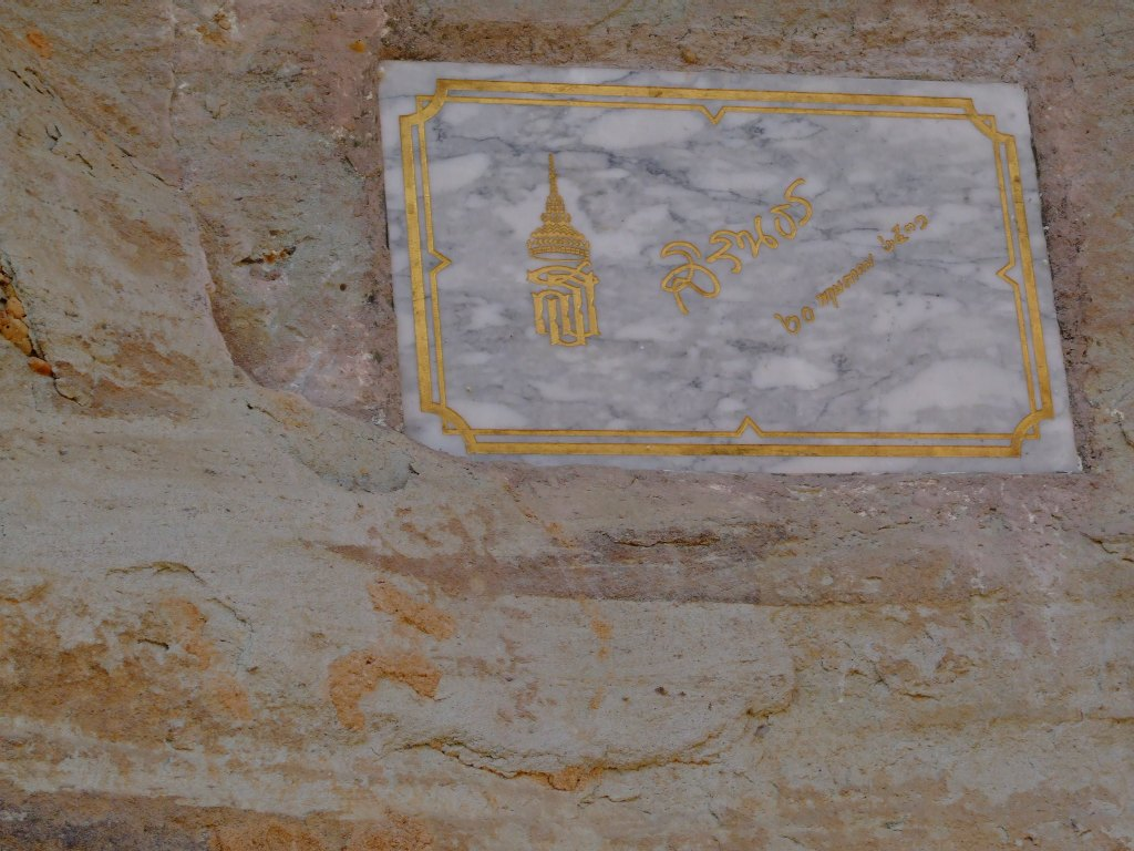 แผ่นศิลาจารึกพระนาม สมเด็จพระเทพรัตนราชสุดาฯ สยามบรมราชกุมารี เมื่อครั้งเสด็จเยี่ยมชมอุทยานแห่งชาติผาแต้ม 20 พฤษภาคม พ.ศ. 2531 สัญญาอนุญาต The present photo is taken or owned by Thanyakij. The camera used was: Fujifilm Finepix S9500.